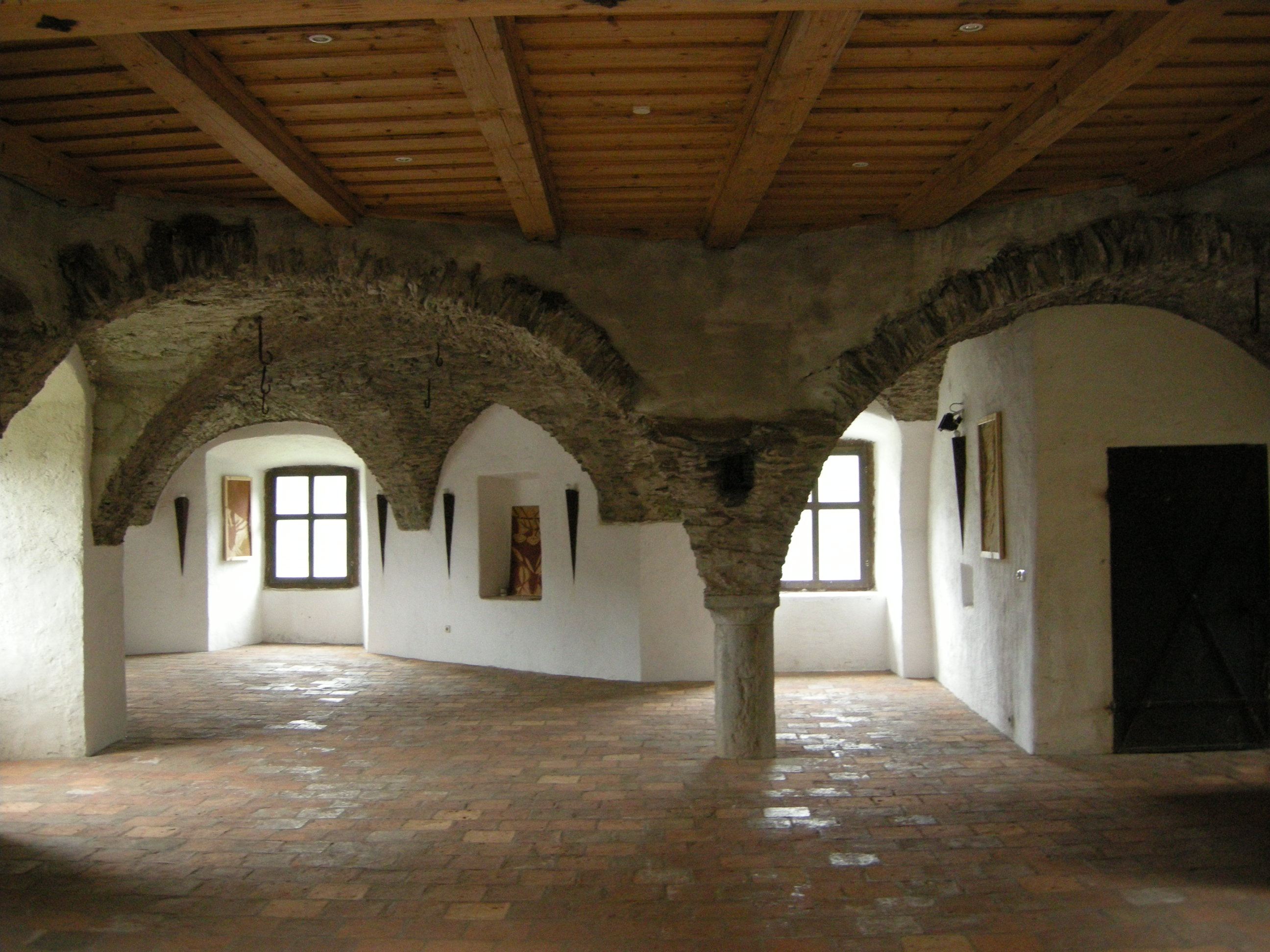 Gmünd, castello